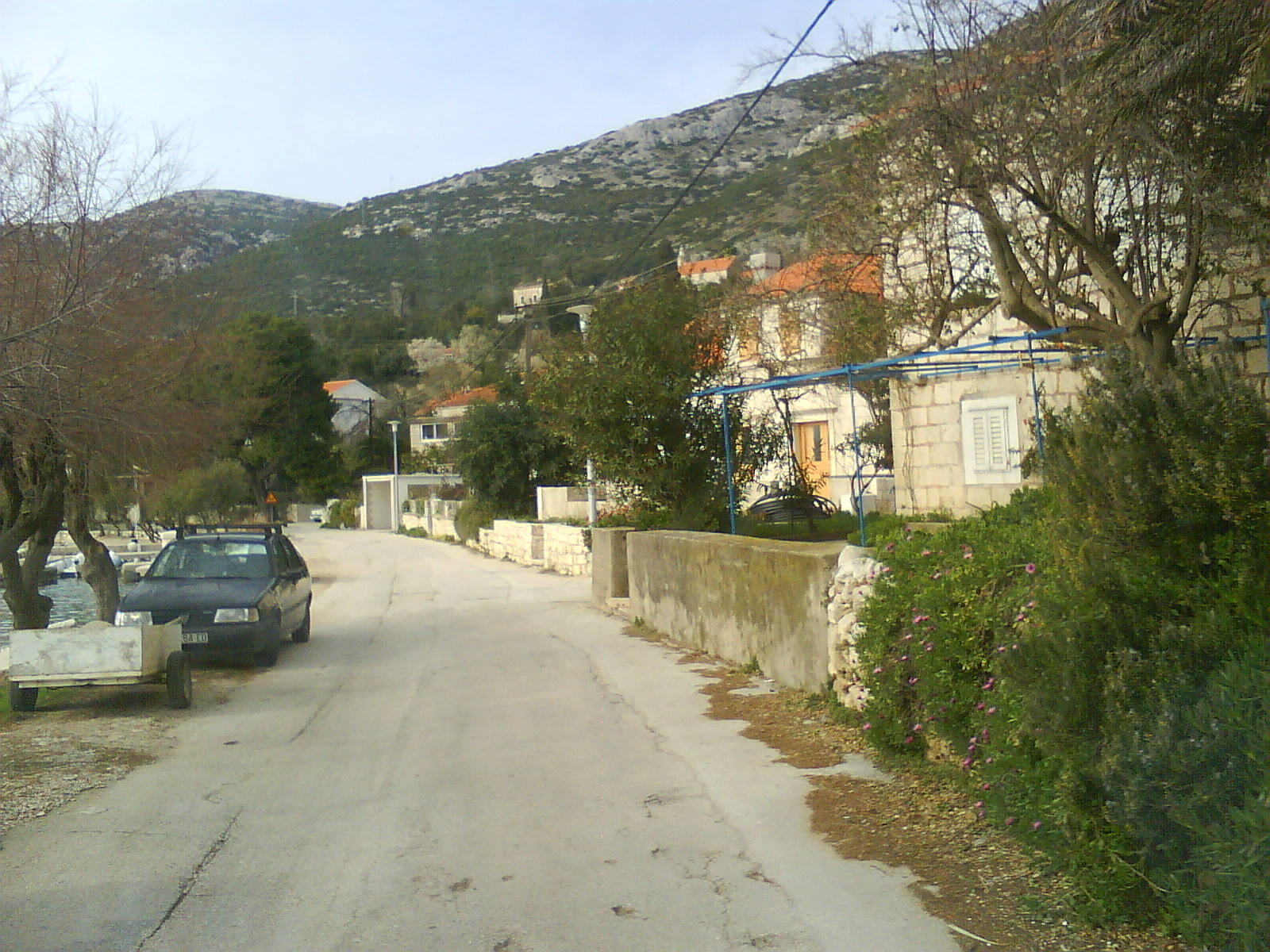 Viganj, a village close to Orebić